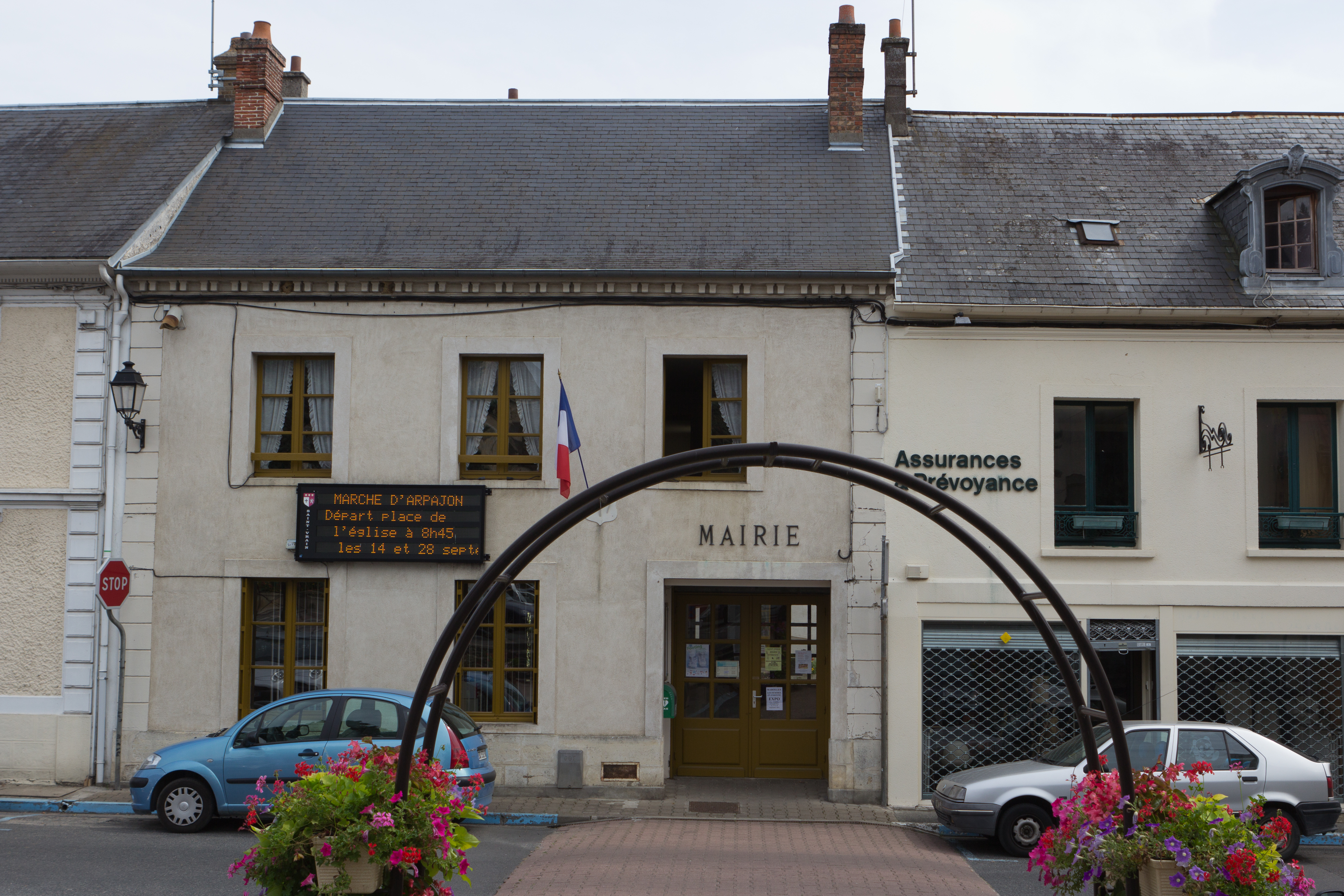 Mairie de Saint-Vrain, commune de Saint-Vrain, département de l'Essonne. France.